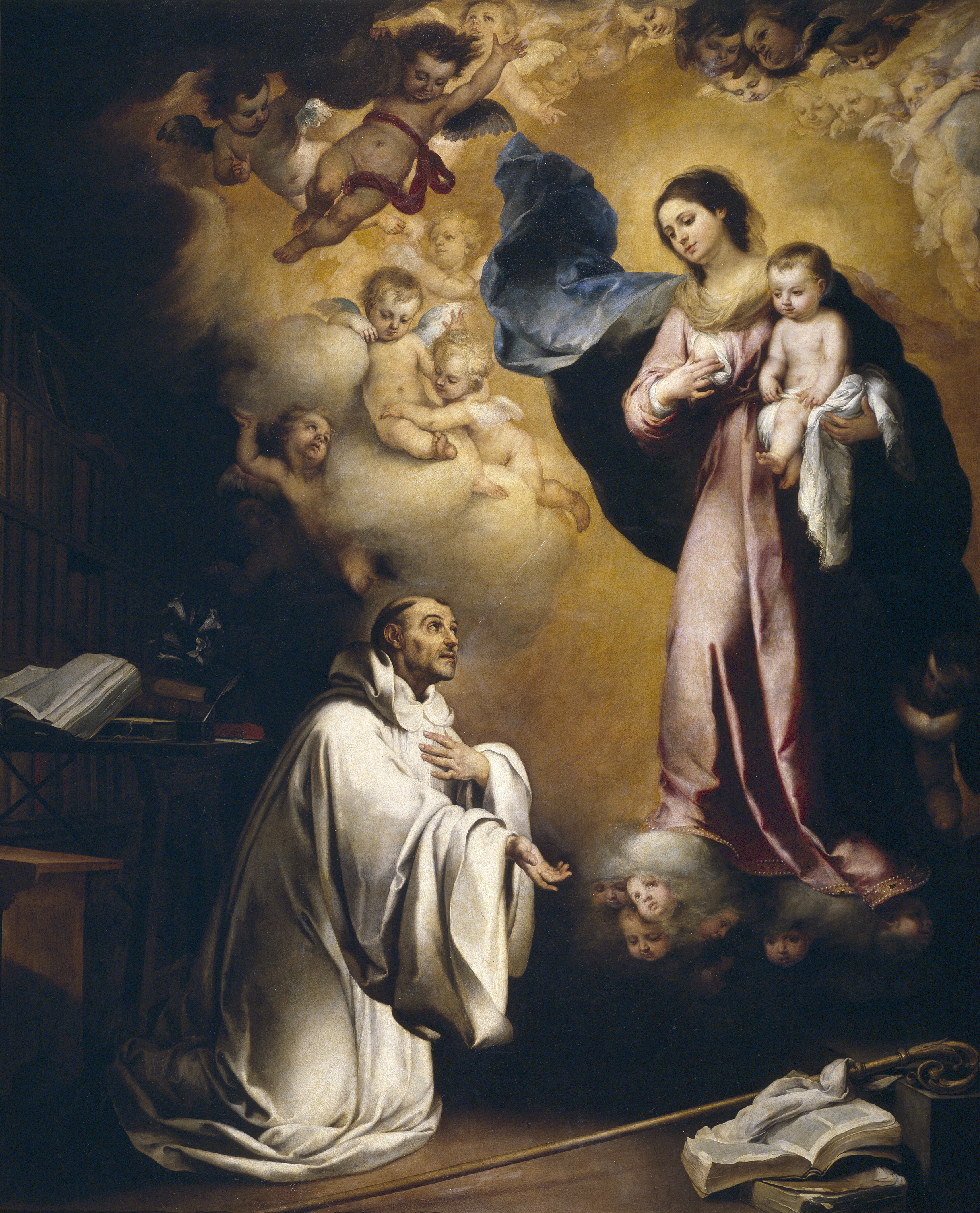 La obra representa a la Virgen María, que lleva en sus brazos al Niño Jesús, apareciéndose a San Bernardo de Claraval.